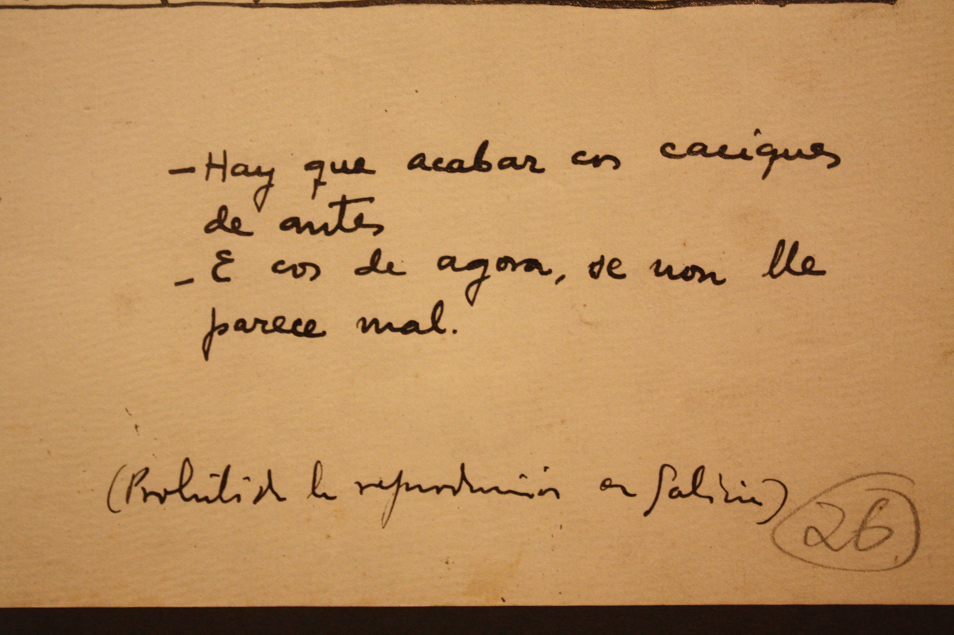 No pé dun debuxo de Castelao no que dous paisanos falan de acabar cos caciques, o censor anota a prohibición da súa reprodución en Galicia.